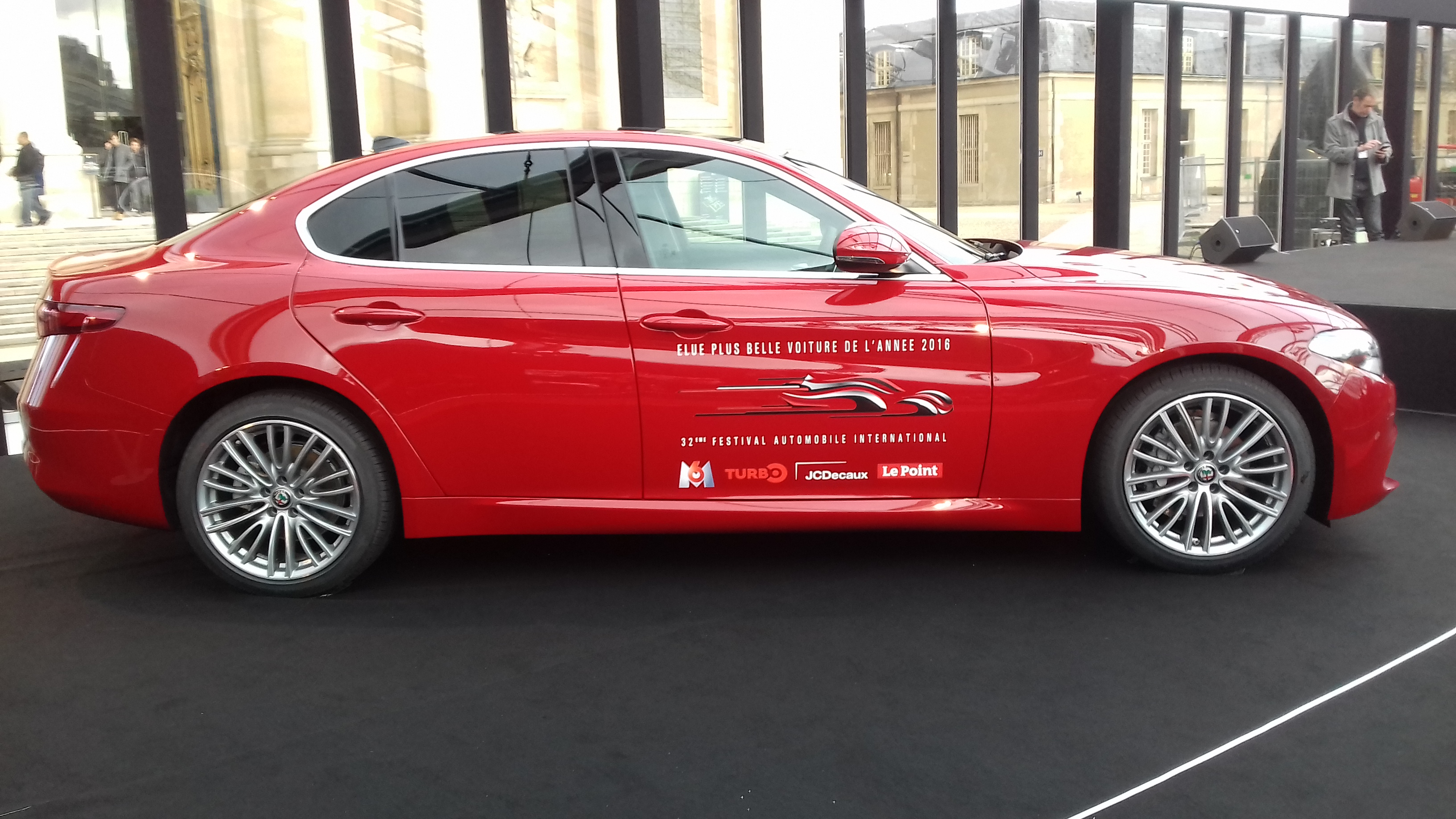 Alfa Romeo Giulia au Festival automobile international 2017